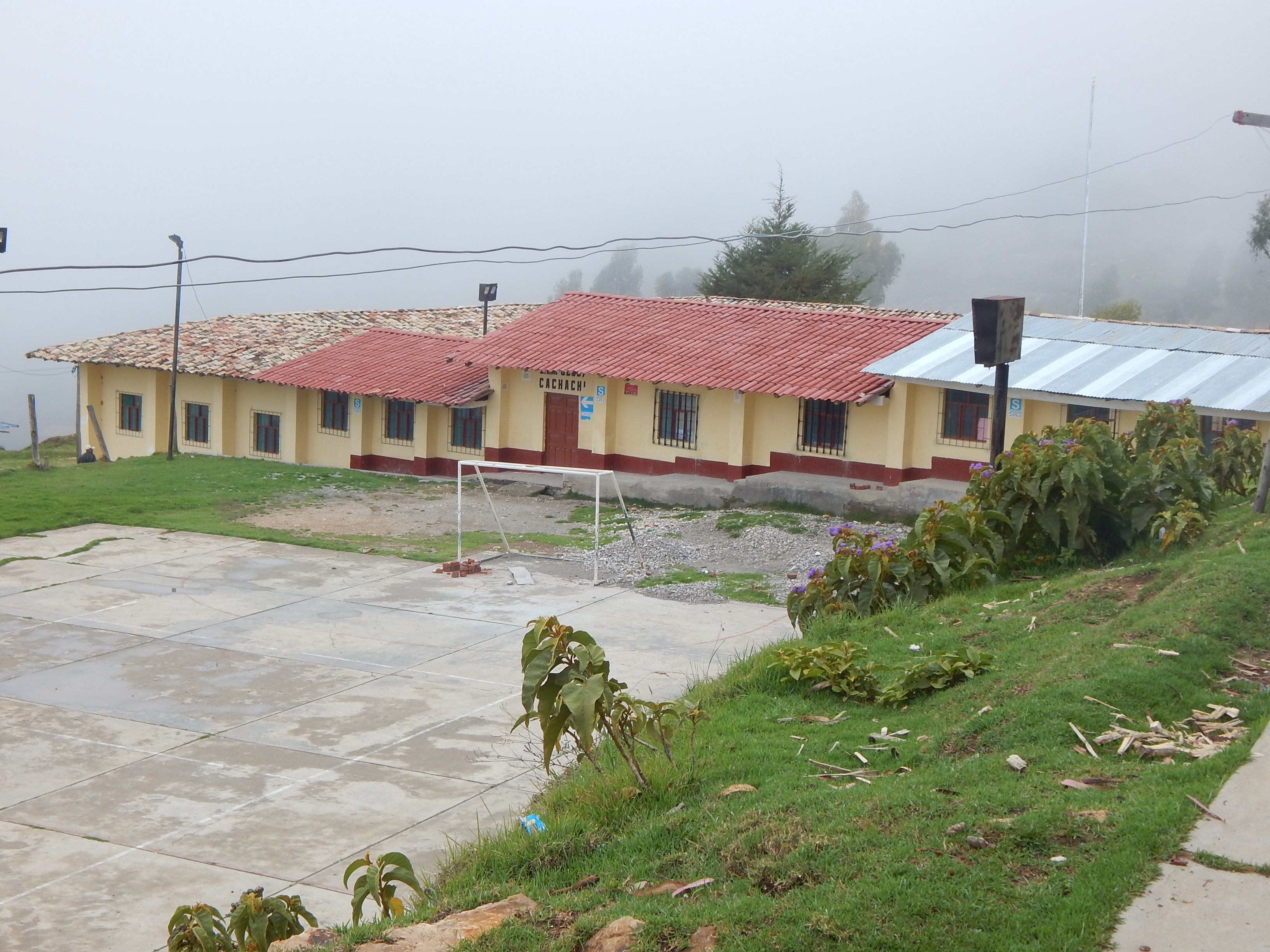 Escuela primaria de Cachachi. Foto reciente, tomada en enero de 2016.